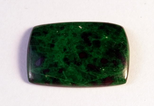 "MawSitSit" (Jadealbit, Albitjadeit) mit 25,5ct aus der G-Empire The World of Gems - Die Welt der Edelsteine Sammlung, gefunden im Himalaya